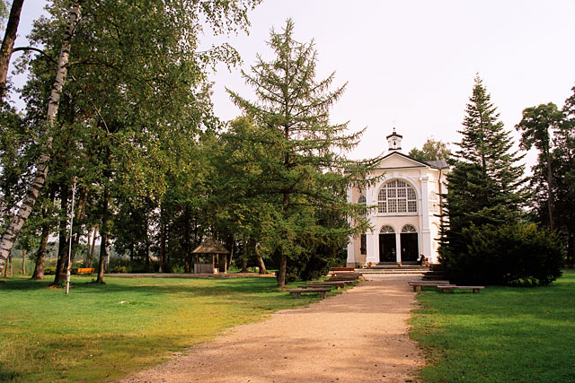 Kaplica na wyspie w Studzienicznej, koło Augustowa